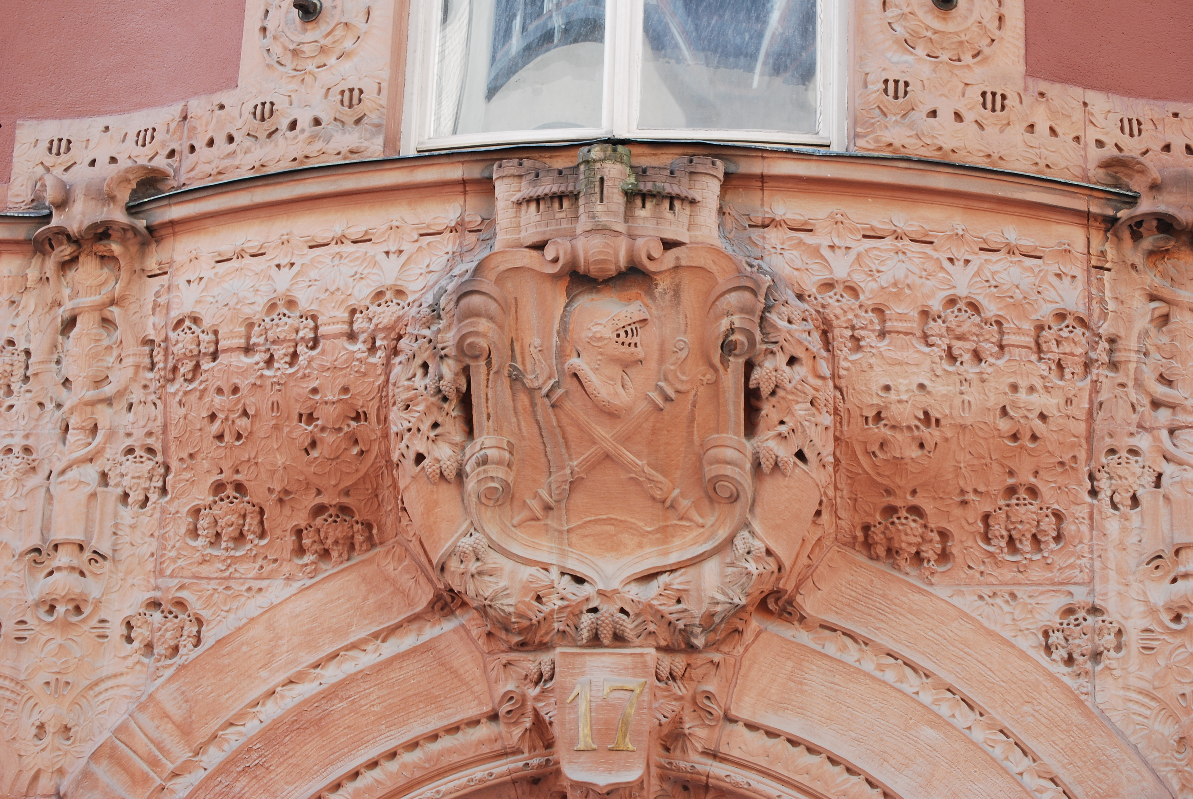 Sundsvalls Handelsbank, Drottninggatan 17, fasaddetalj